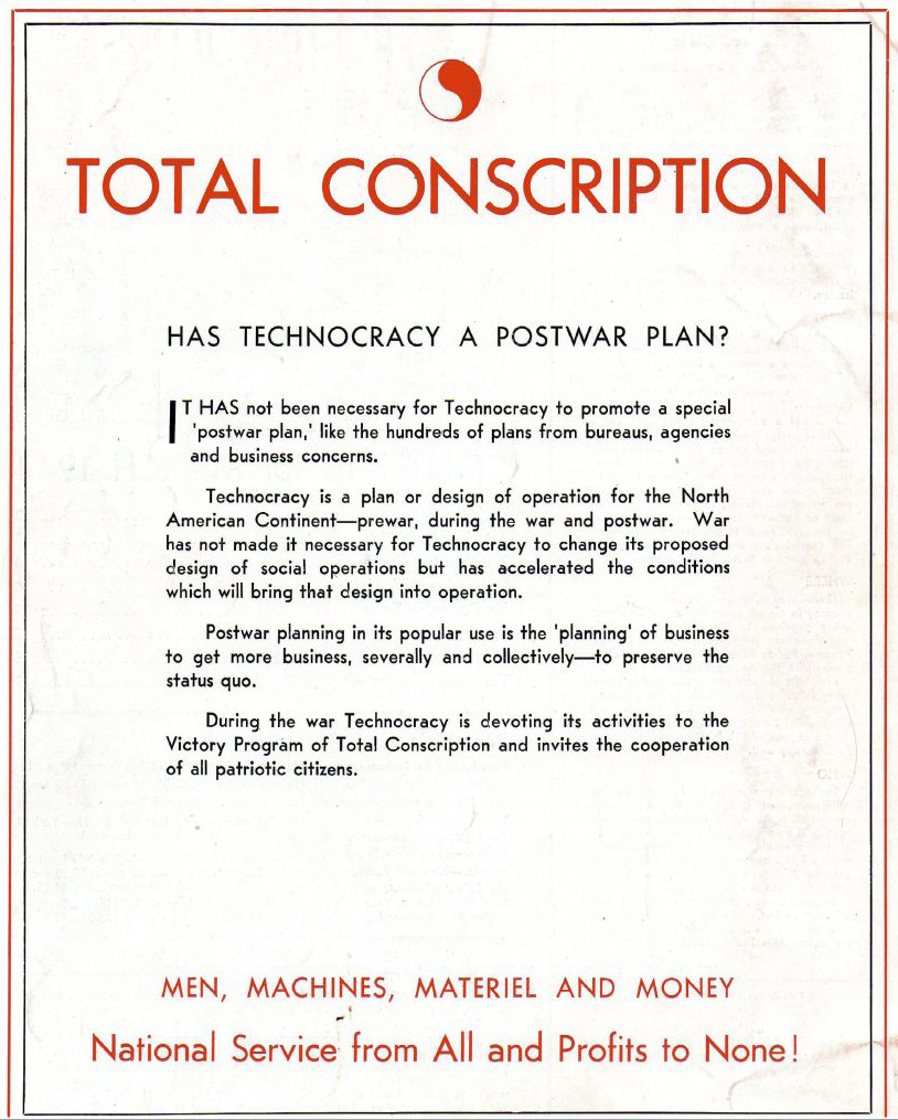 Publicité de Technocracy Inc. pour appel à la constricption totale, en 1944